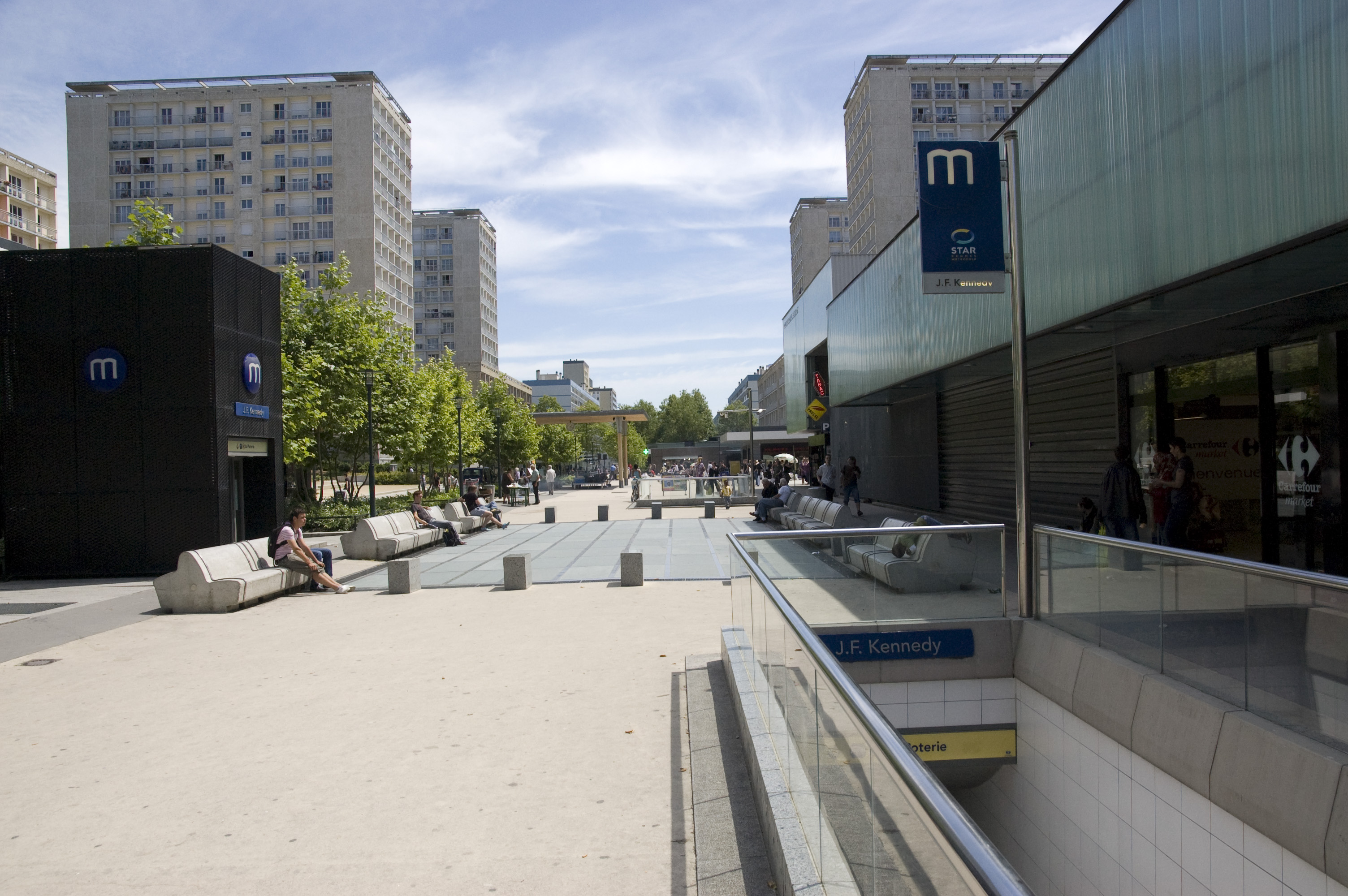 Station de Métro JF. Kennedy vers est (avenue Winston Churchill).